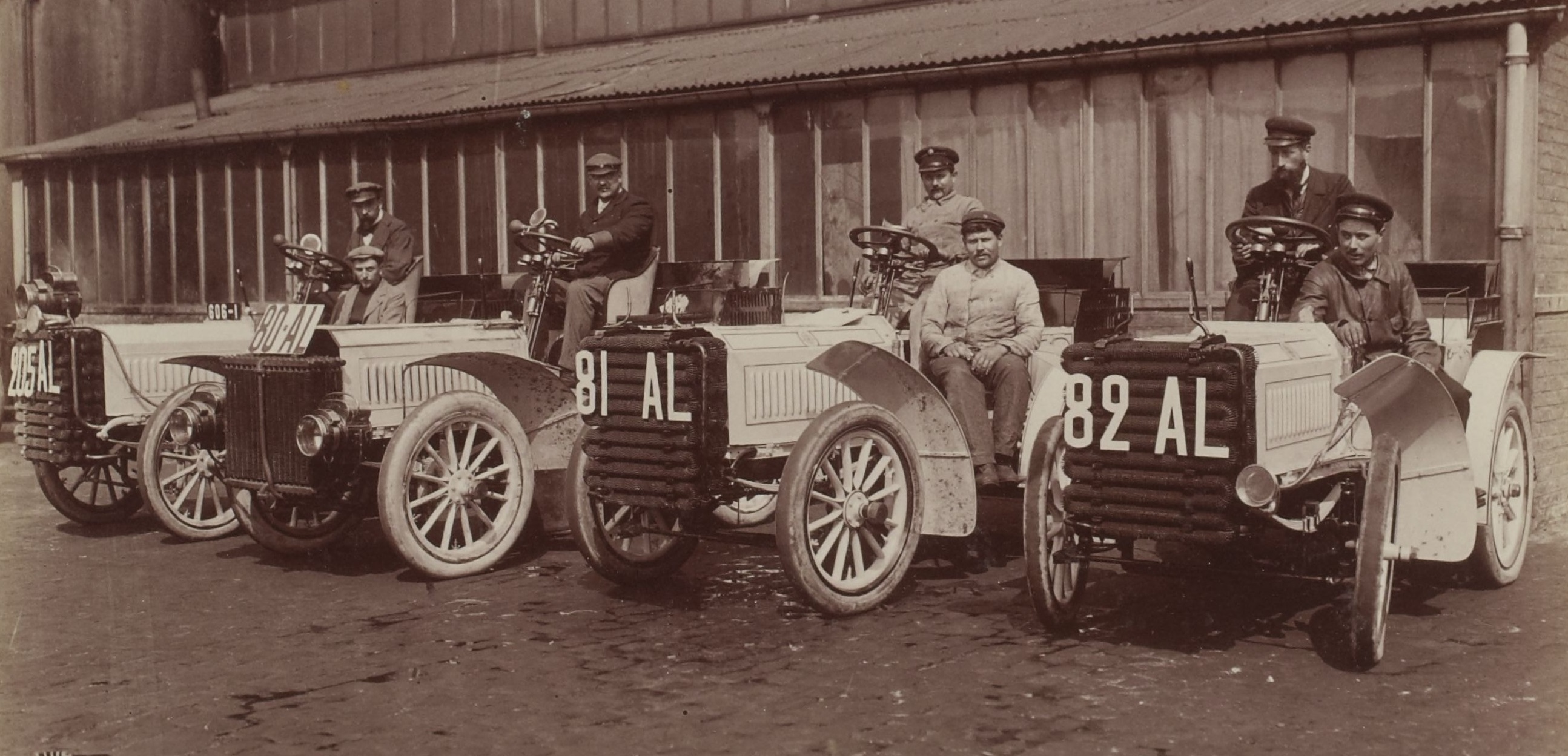 [Collection Jules Beau. Photographie sportive] : T. 18. Année 1902 / Jules Beau : F. 18v. [Paris - Vienne, épreuve de vitesse]